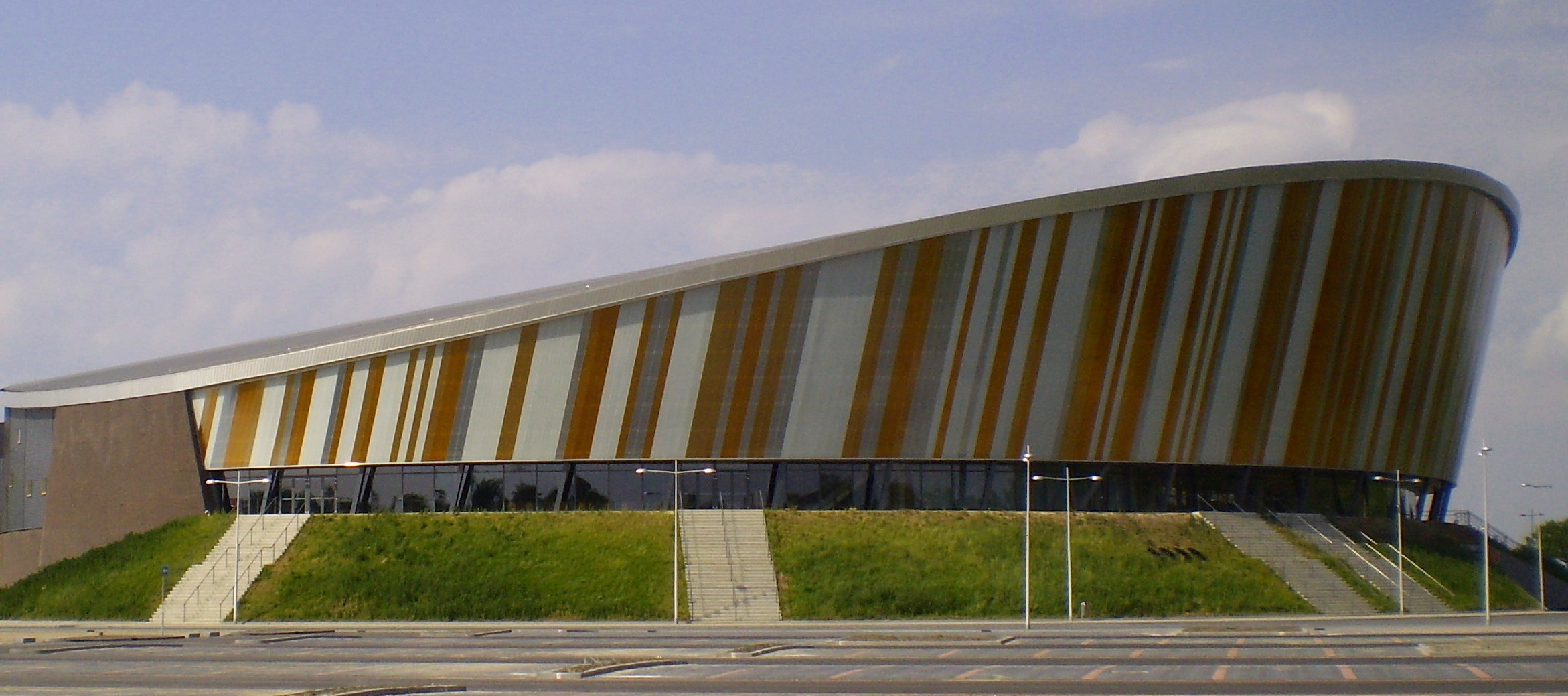 Sportstadion Omnisport Apeldoorn, Nederland